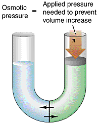 Presio osmotikoa adierazten duen irudia.